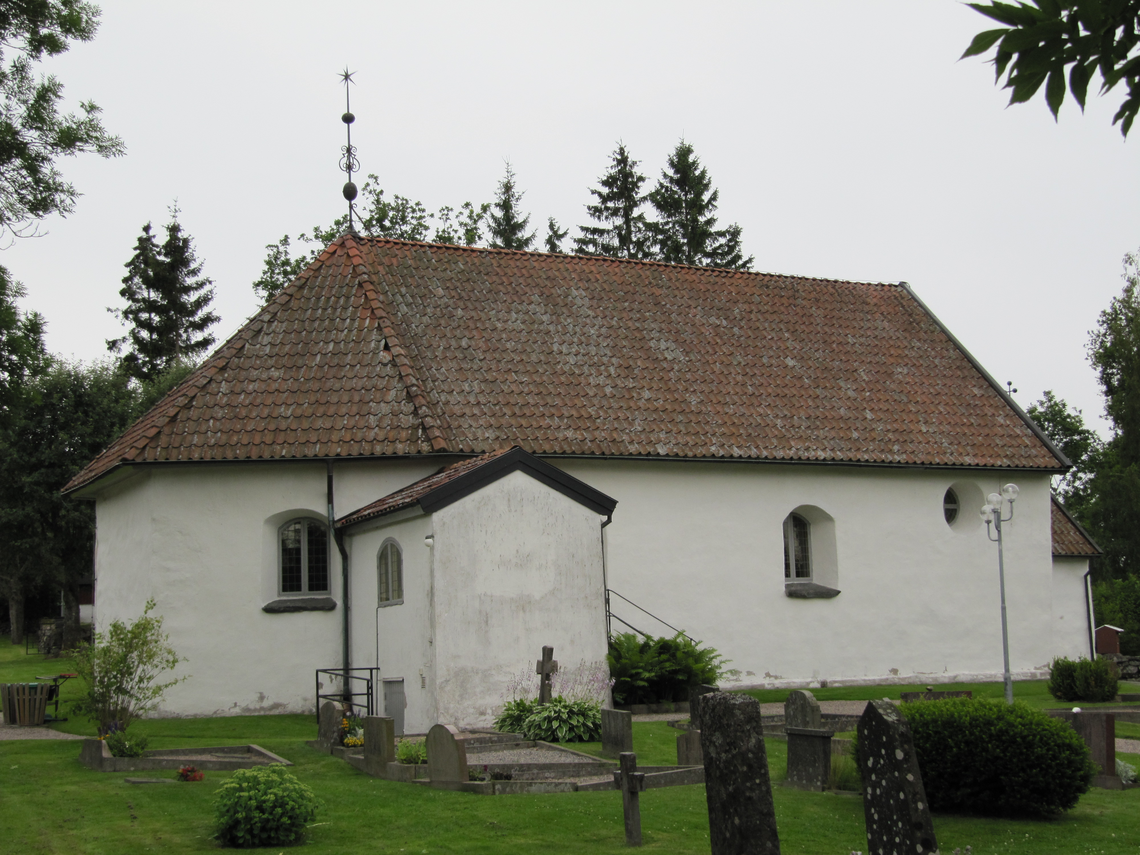 Tunge kyrka